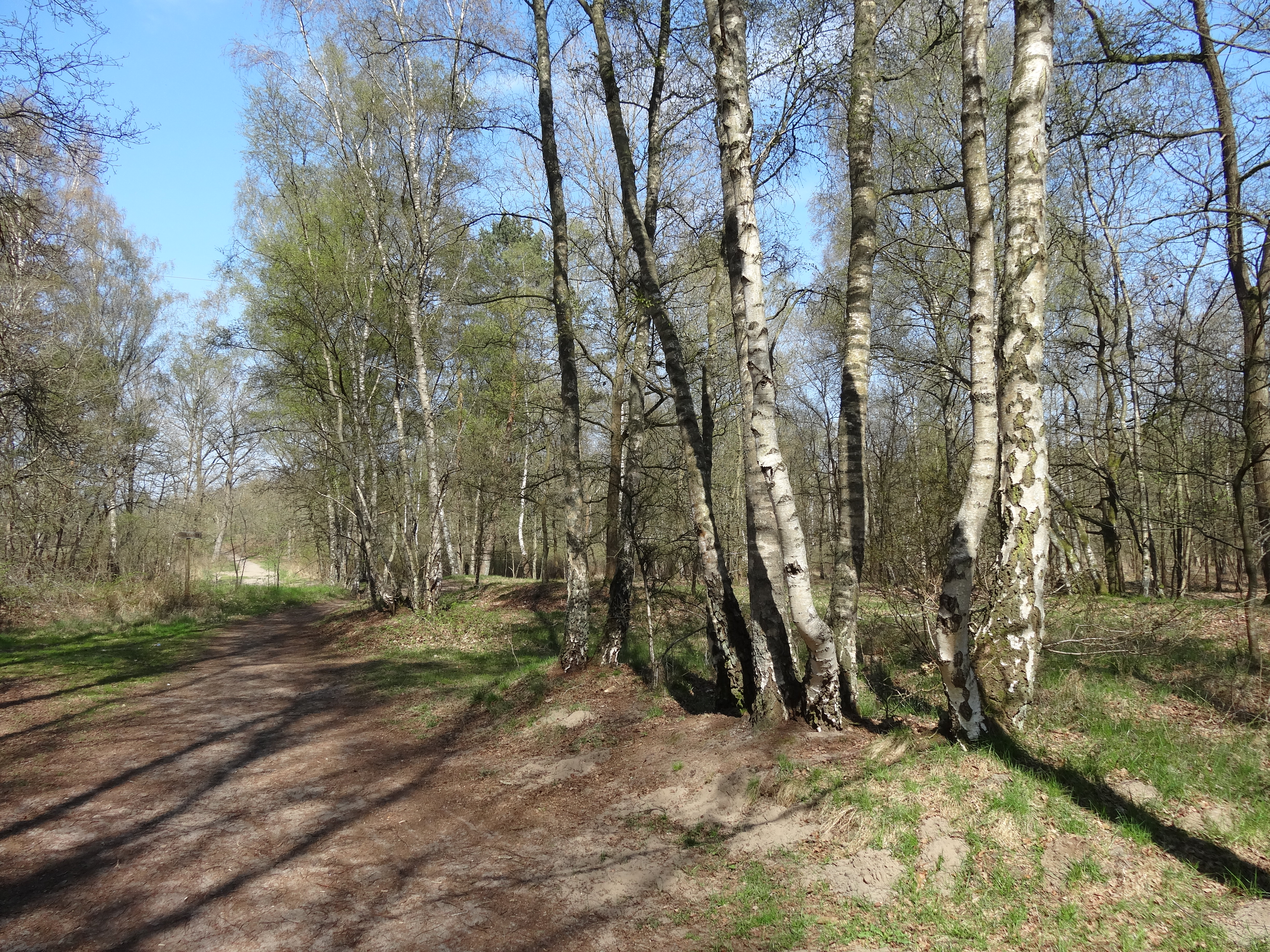 Kremperheider Binnendünen Ein Teil davon könnte zum Naturschutzgebiet "Binnendünen Nordoe" ernannt werden. Weitere Informationen auf der abgebildeten Infotafel in der Kategorie.